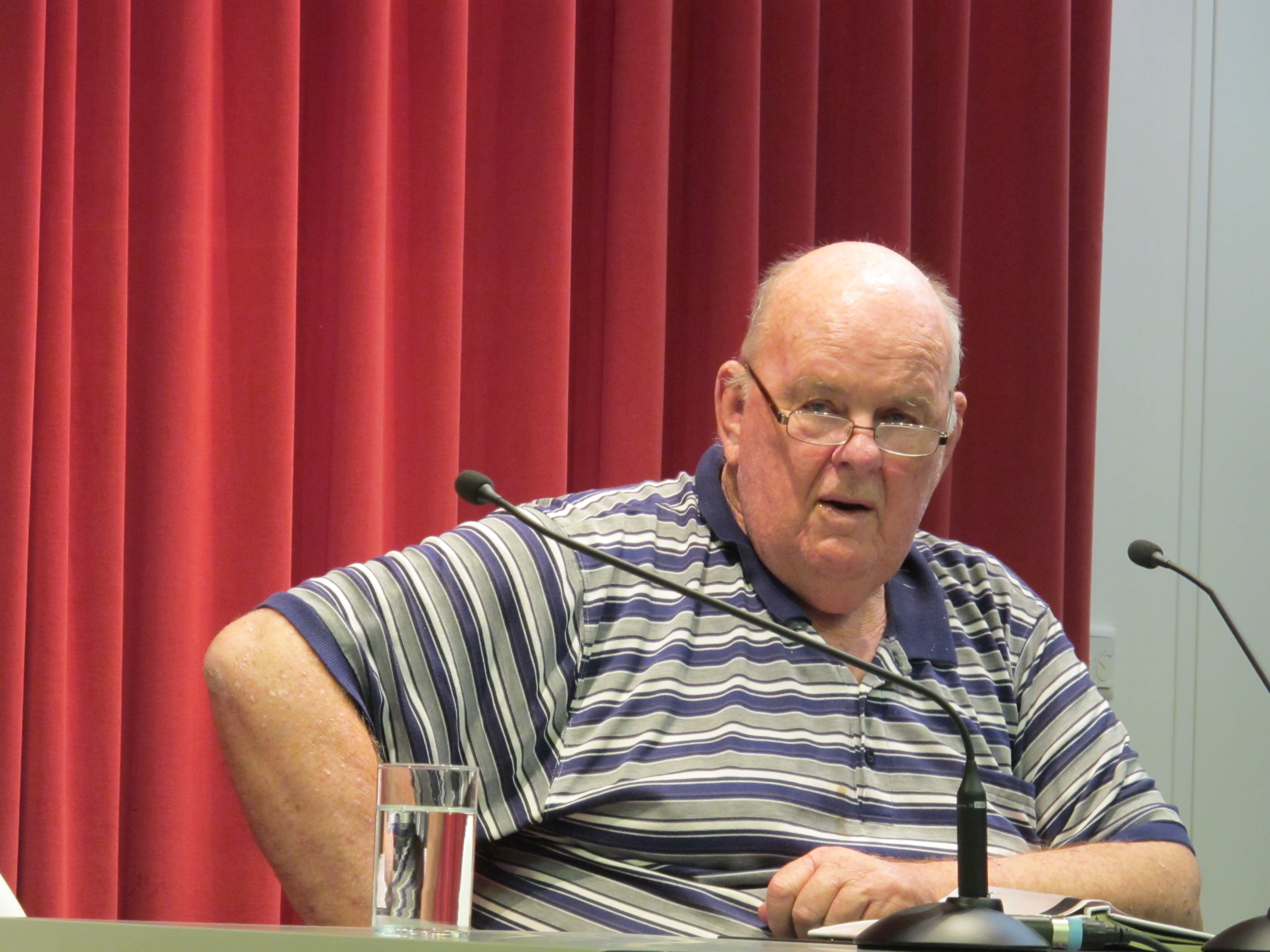 Les Murray im Lyrikkabinett München 2014